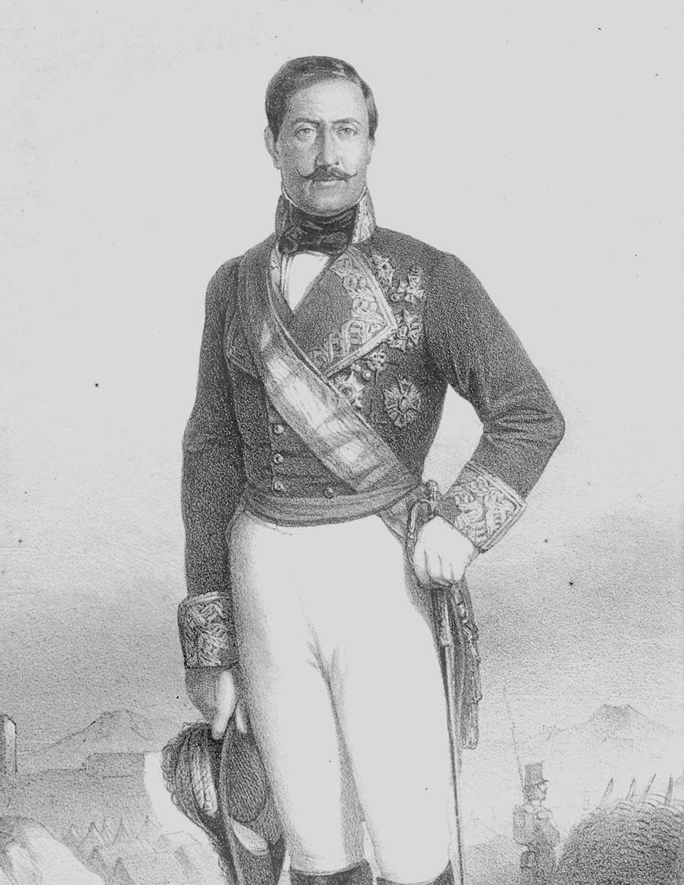 Grabado del teniente coronel Fernando Norzagaray Escudero.